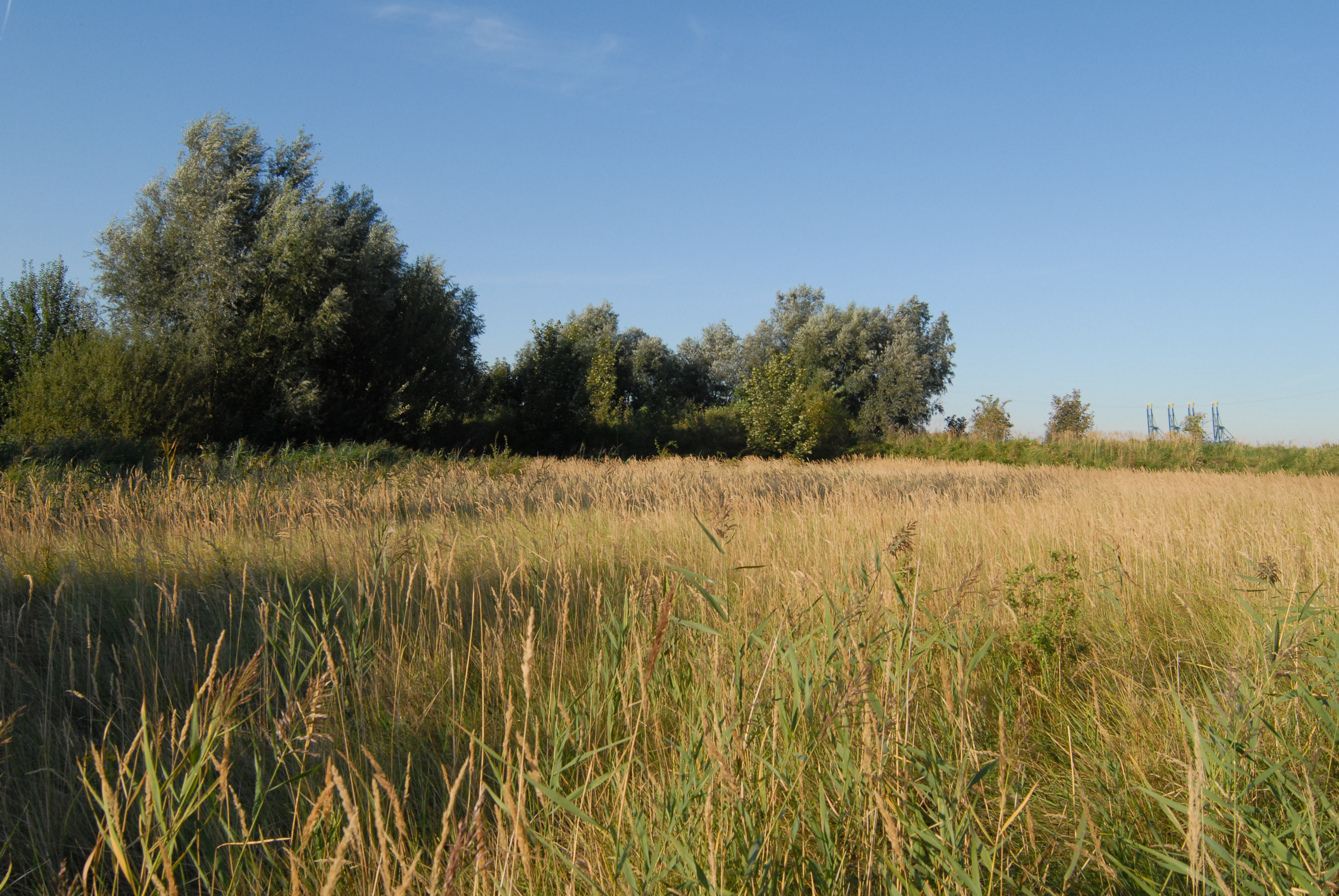 Natuurgebied "Potpolder" ten zuiden van Lillo in de Haven van Antwerpen